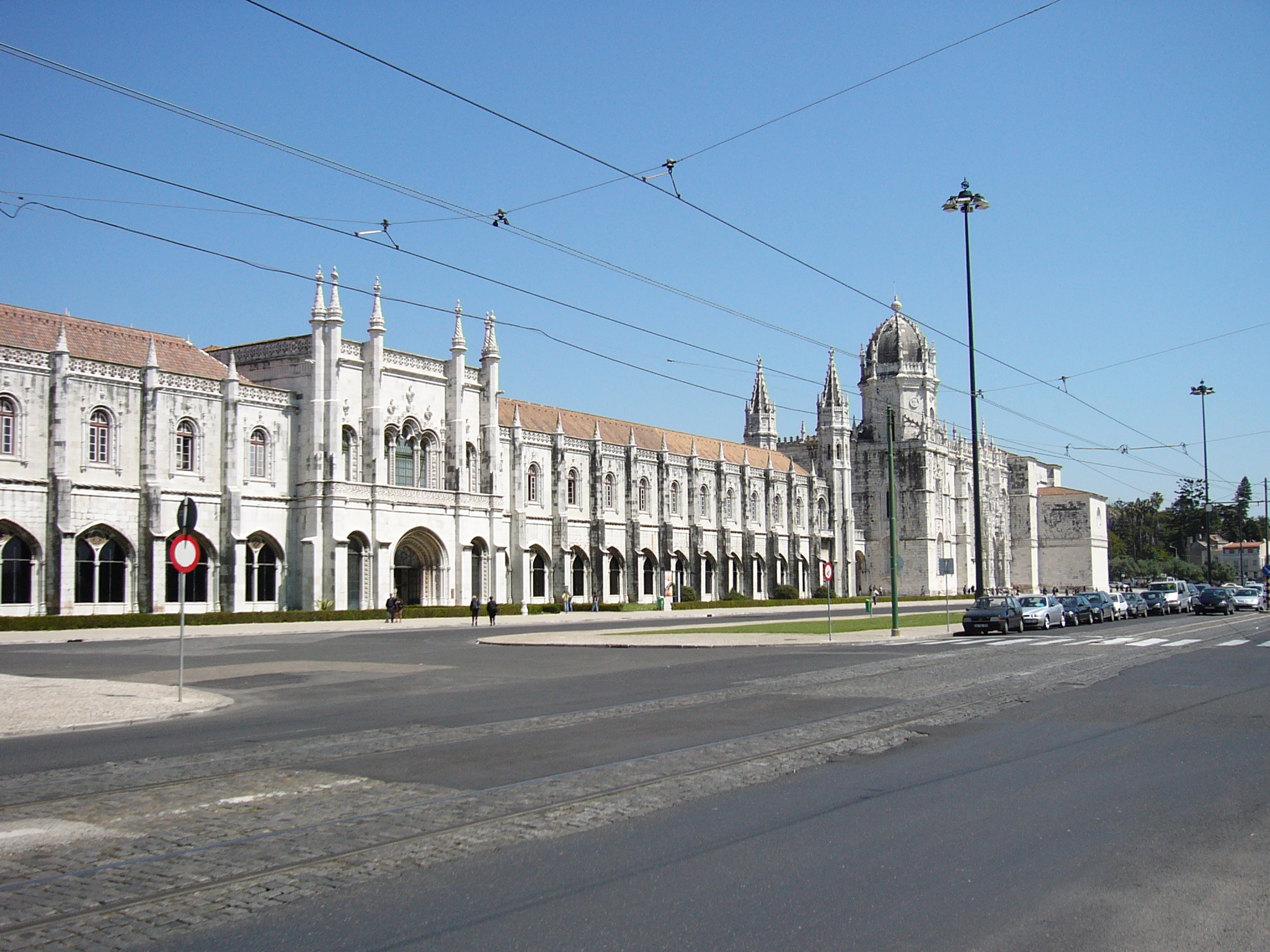 Monasterio de los Jerónimos en Lisboa. Foto tomada el 14 de abril de 2004